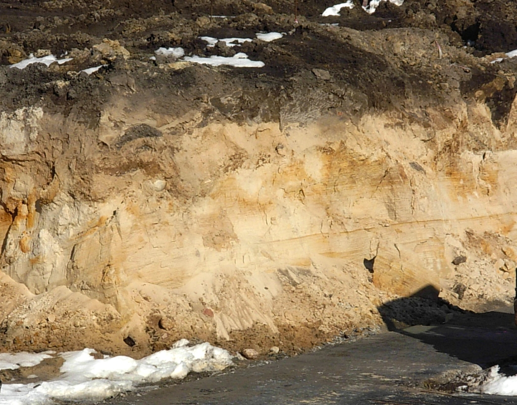 Profil gleby na osiedlu Wzgórze Wolności w Bydgoszczy